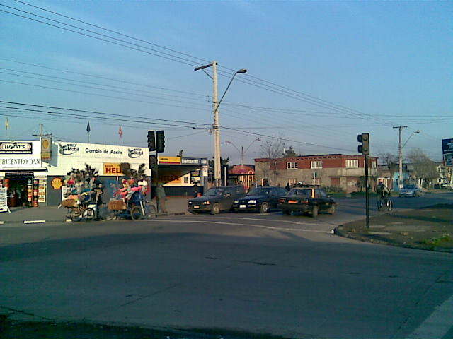 Salvador Gutierrez con Samuel Izquierdo, Quinta Normal, Santiago, Chile.